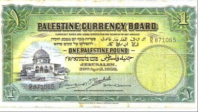 الجنيه الفلسطيني